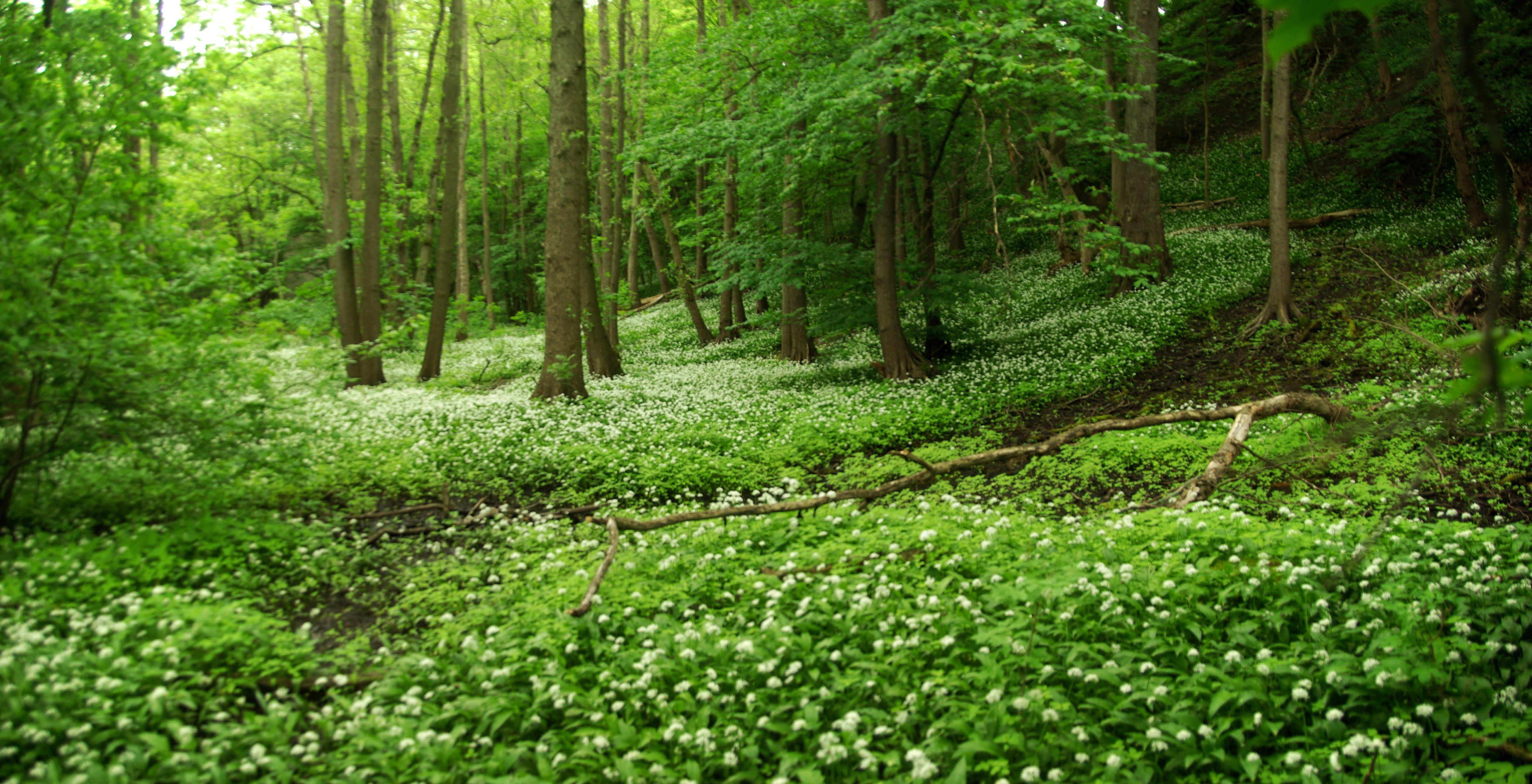 Haabneeme-klindiastangu maastikukaitseala